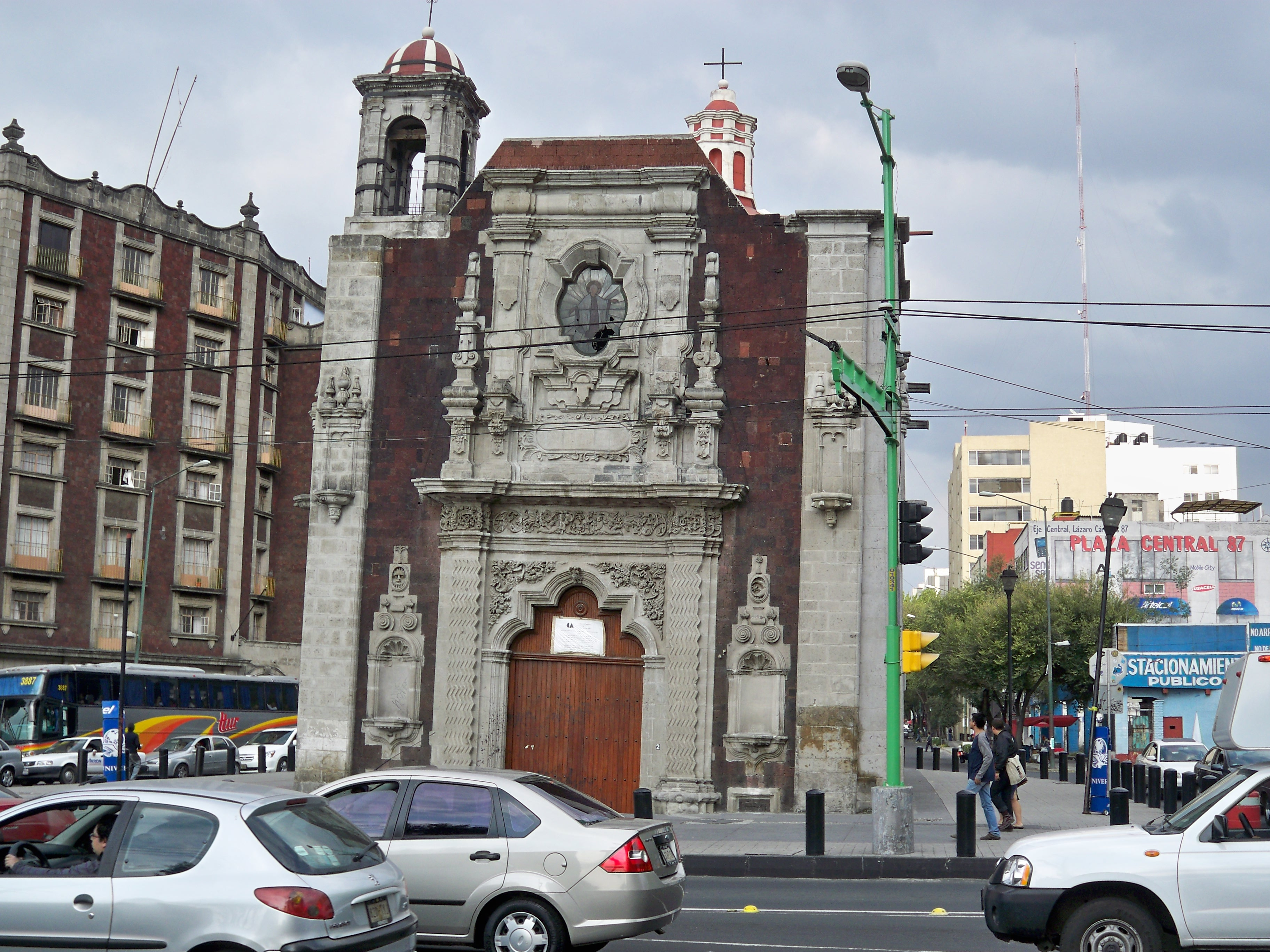 Templo de la Inmaculada Concepción del Salto del Agua